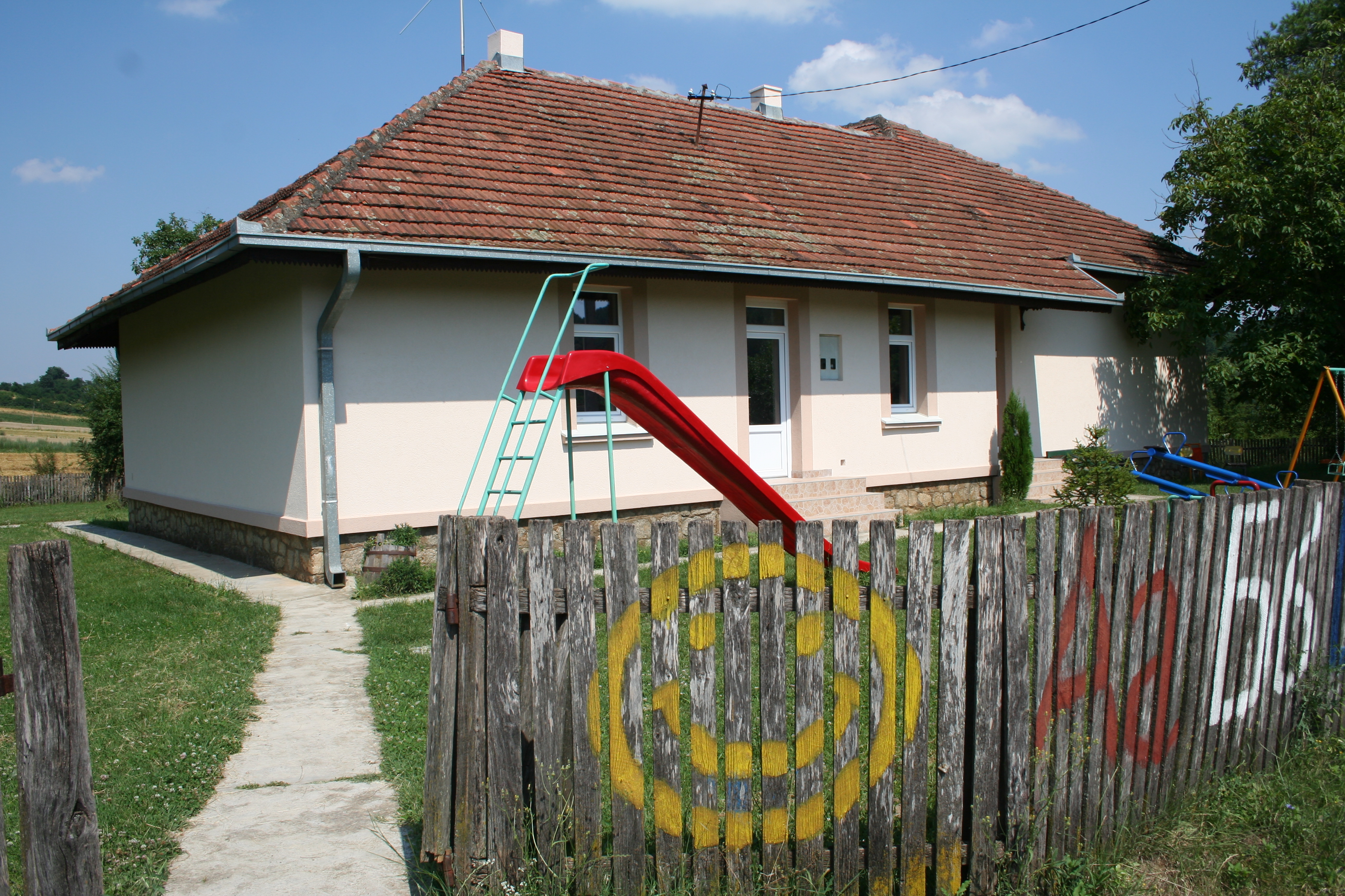 Zgrada škole, Bojić